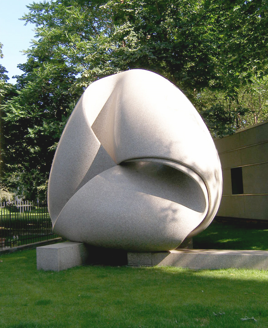 „Kontinuität“, Granitskulptur von Max Bill an der Hauptverwaltung der Deutschen Bank, Frankfurt am Main.